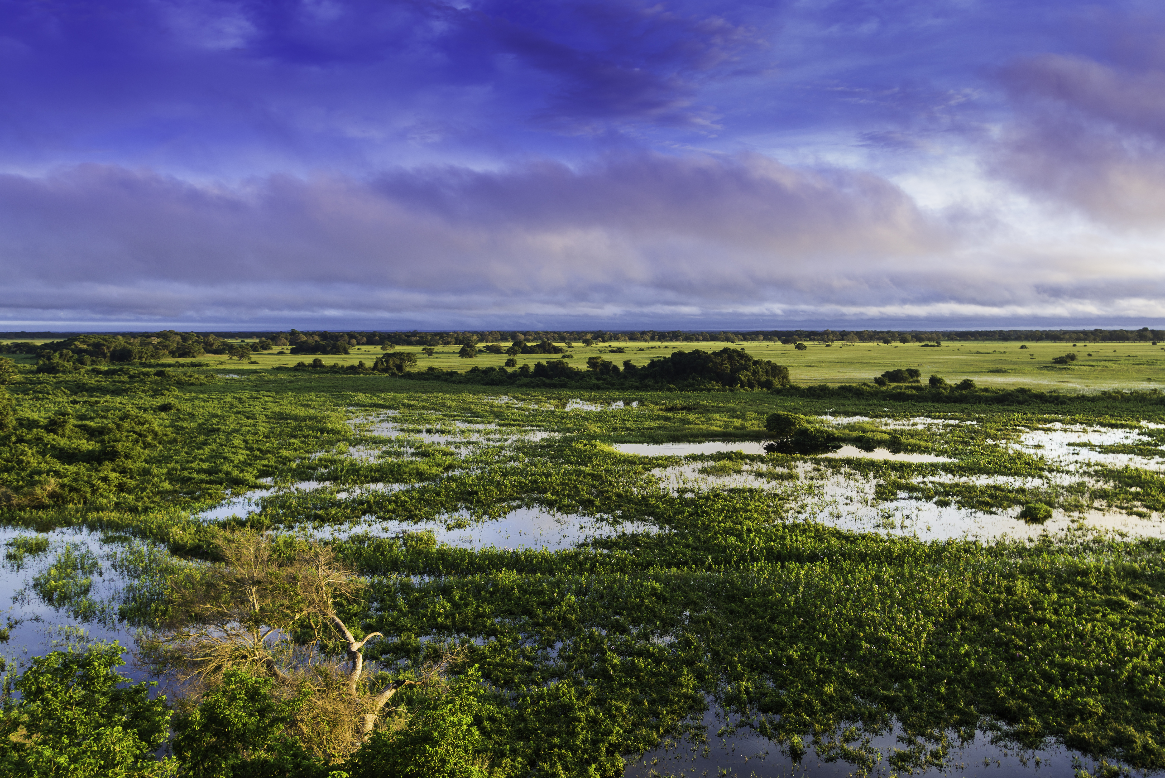 Vista aérea do Pantanal